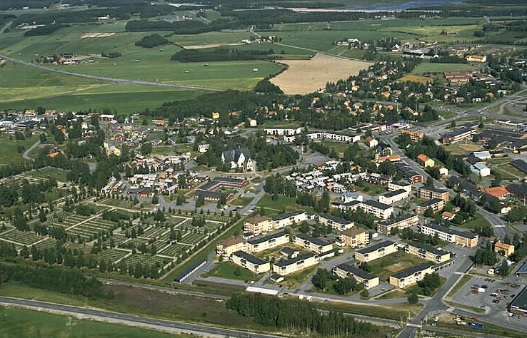 Kyrkstaden i bildens mitt. Motiv: Öjebyn Nyckelord: Flygbilder, Riksintressen Kategori: Kyrkstad Kyrkstaden i bildens mitt.